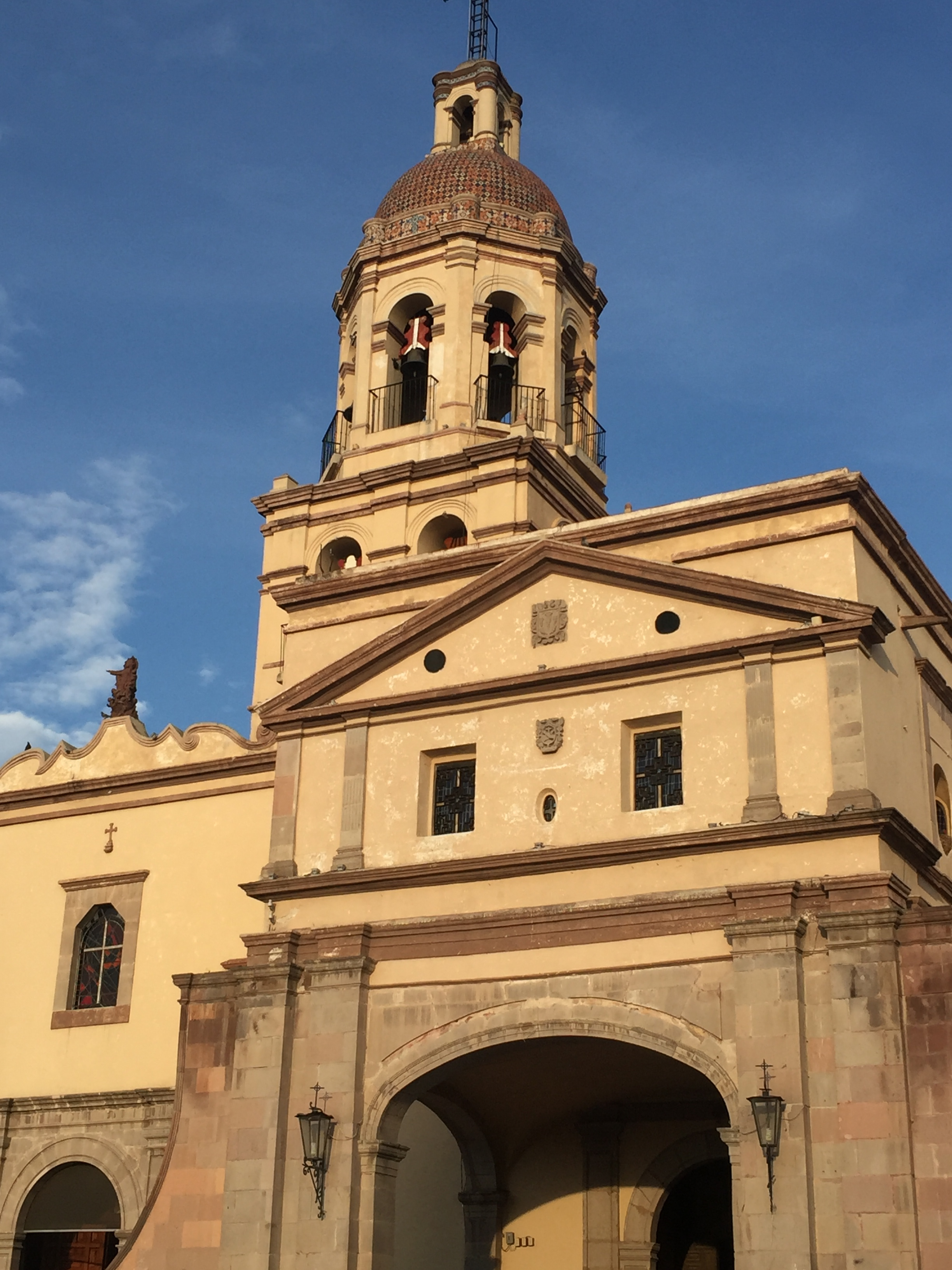 Templo de la Santa Cruz desde fuera.